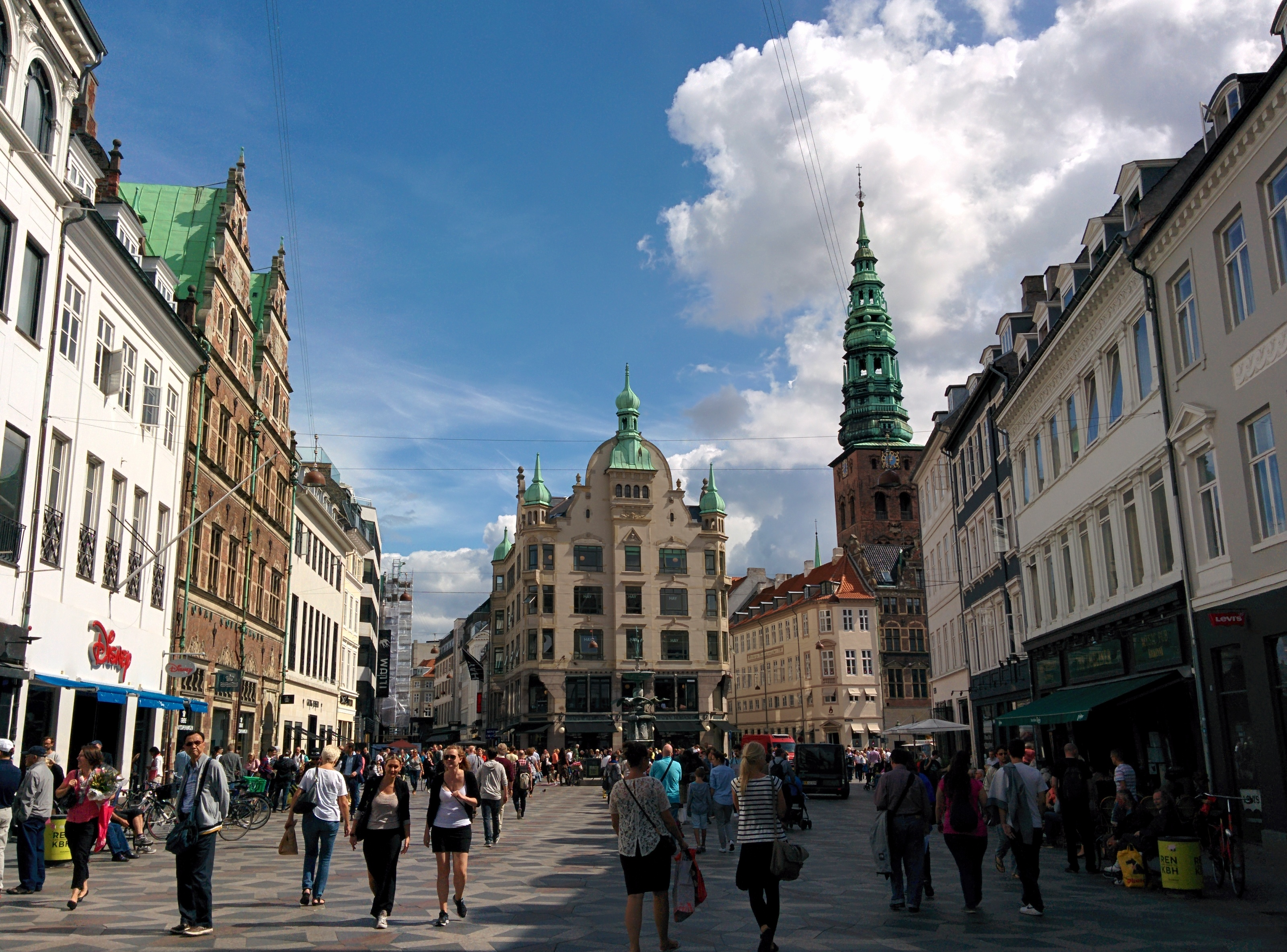 Amagertorv in Copenhagen, Denmark